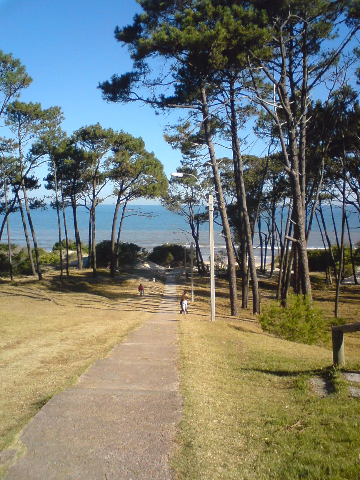 Playa Fortín de Santa Rosa Uruguay